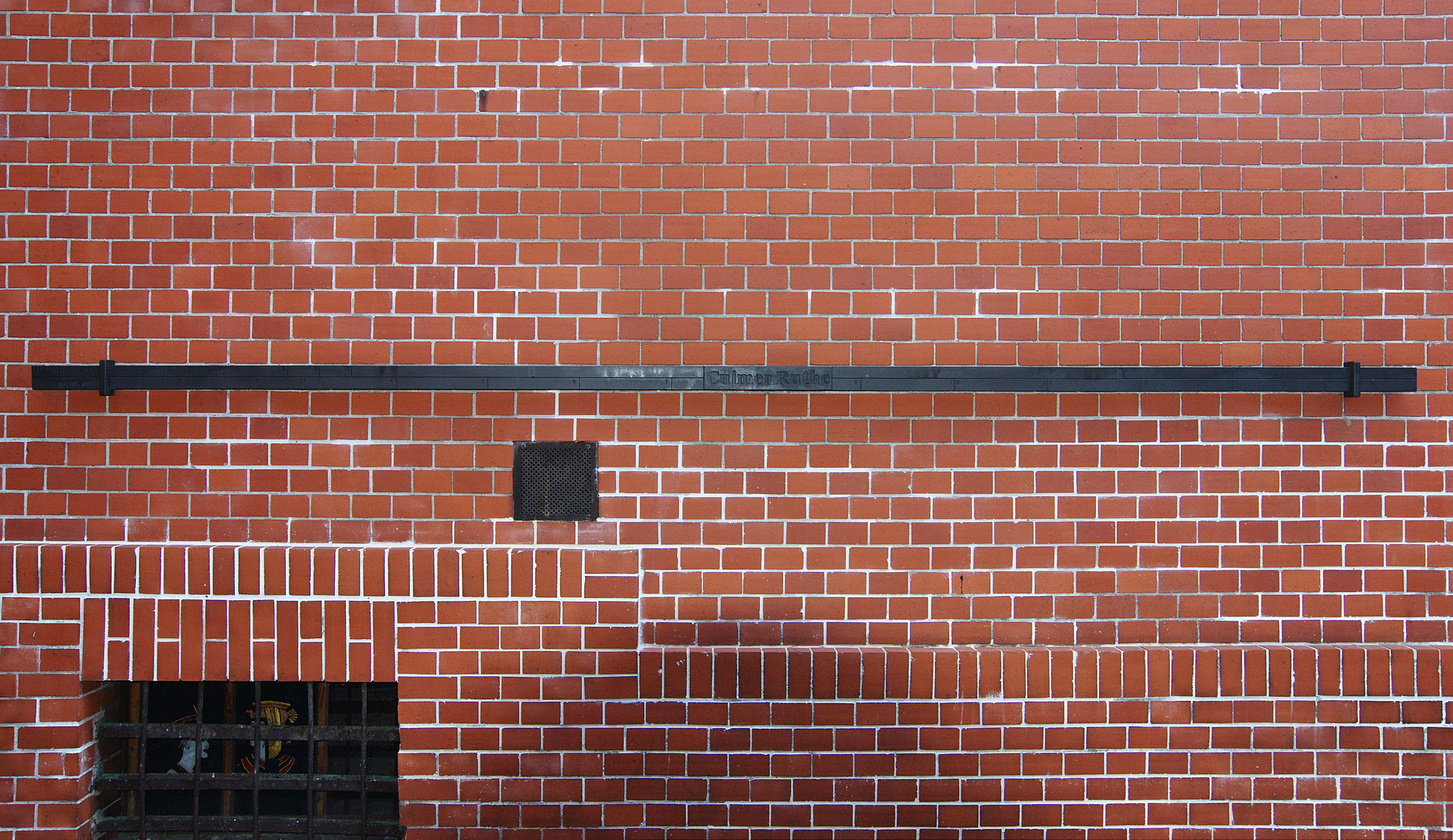 Lębork. Ratusz. Replika pręta chełmińskiego.